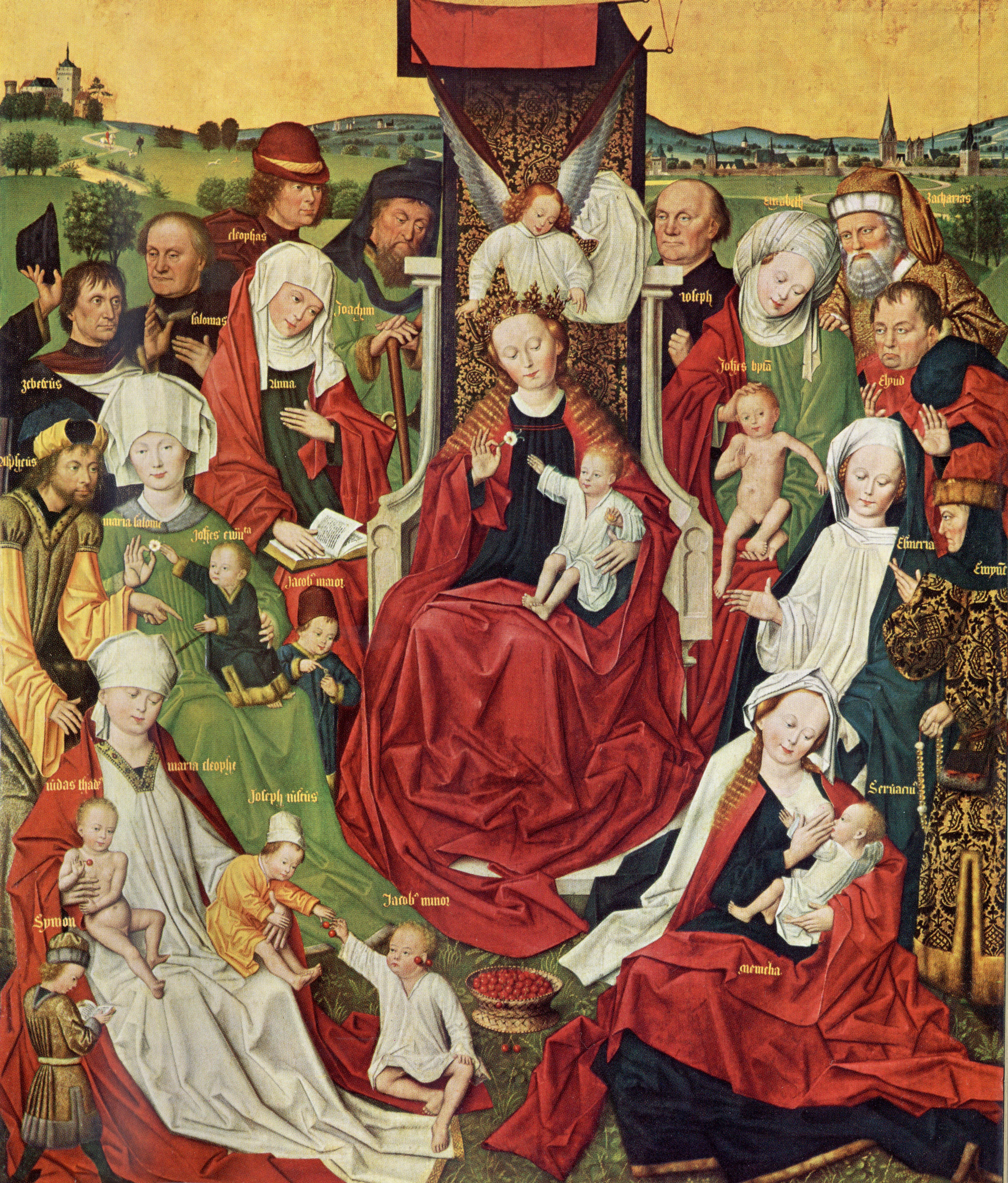 Dortmund Propsteikirche, Derick Baegert Altarbild, linke Tafel